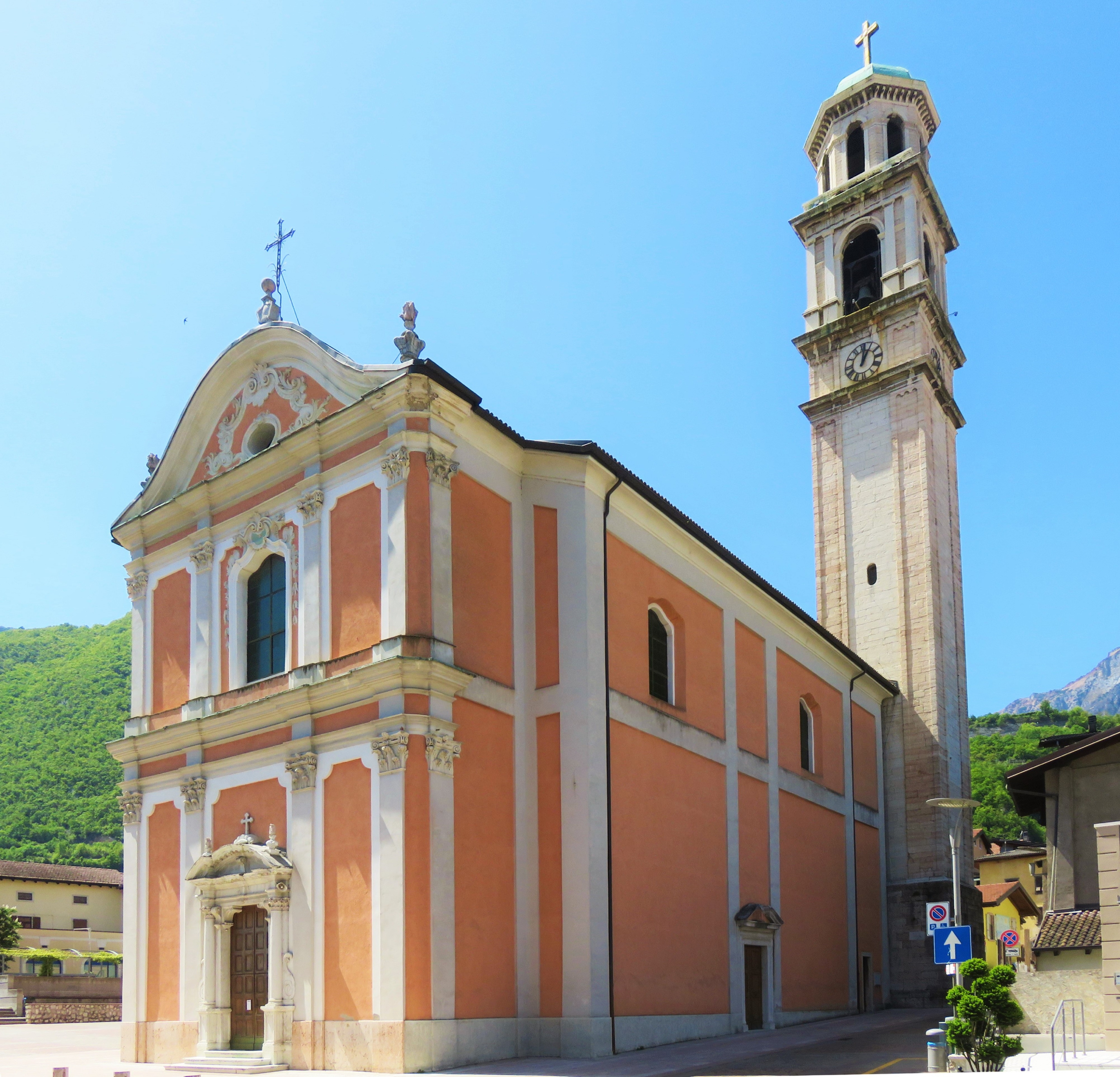 Chiesa di San Modesto, Aldeno. Esterno con campanile.